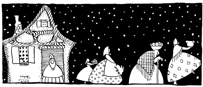 Ignacia Zabaloren (Nor_Nai) Pastorela ilustrazioa, Agere, 1929.